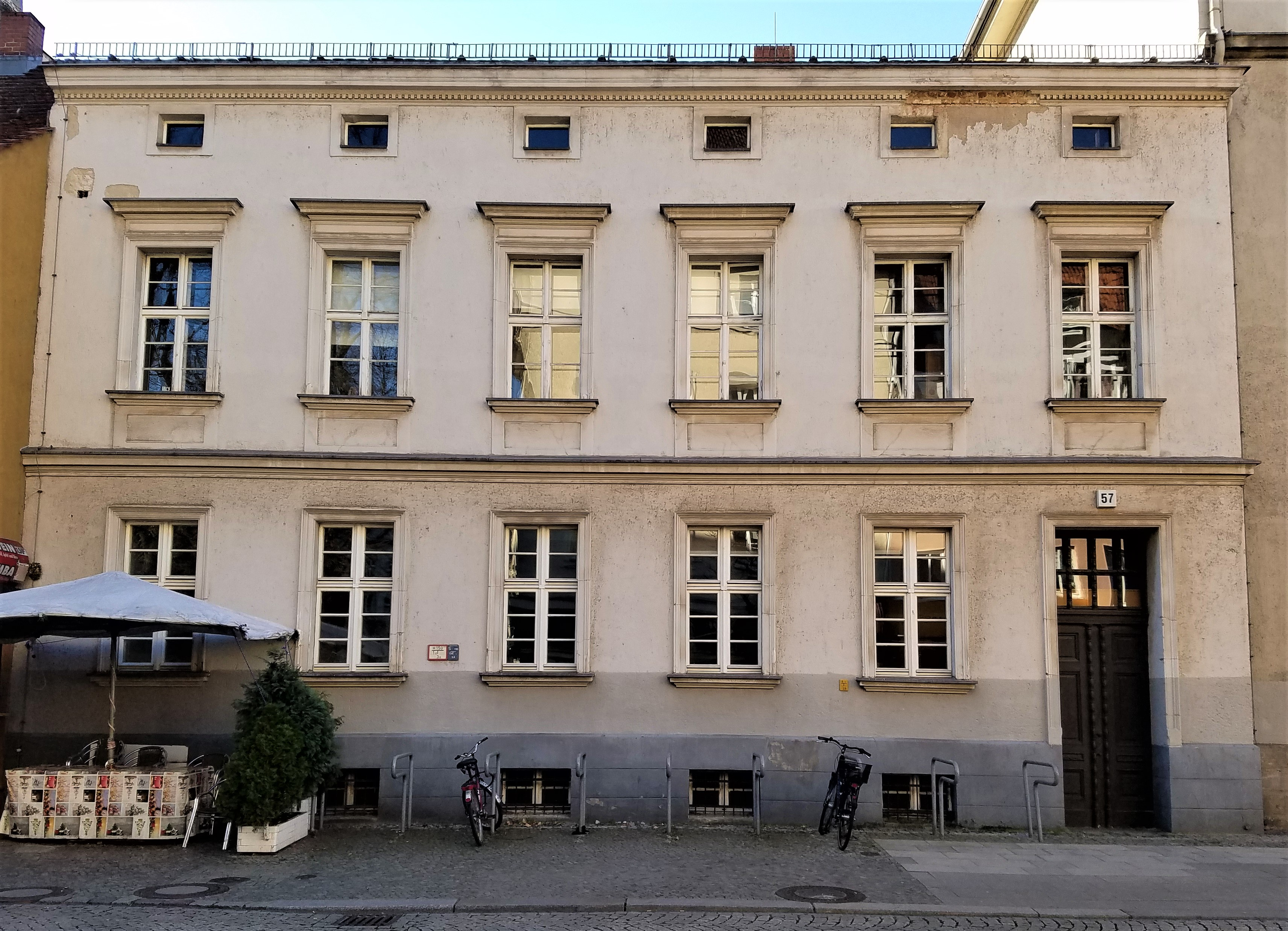 Berlin-Spandau, Carl-Schurz-Straße 57, ehemaliges erbaut nach 1890, Pfarrhaus der Reformierten Johannes-Gemeinde, dann Direktoren-Wohnhaus des Gymnasiums, Teil des Kulturdenkmals 09085522